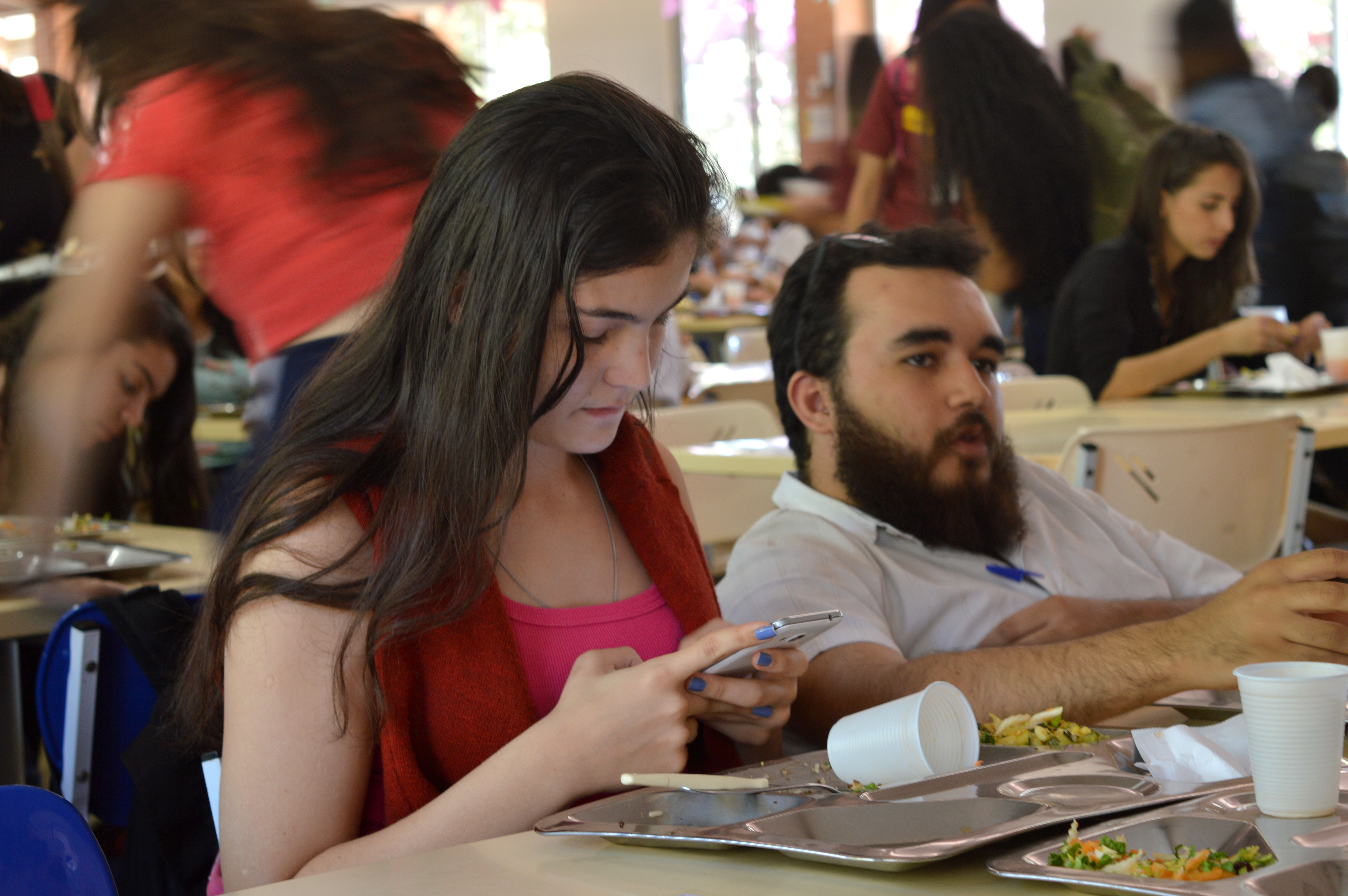 Estudantes no Restaurante Universitário da UFG Samambaia, junho de 2016.